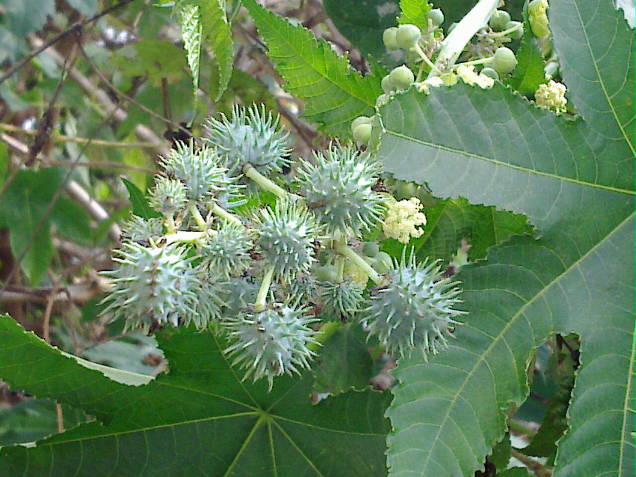 ஆமணக்கு காய்கள்